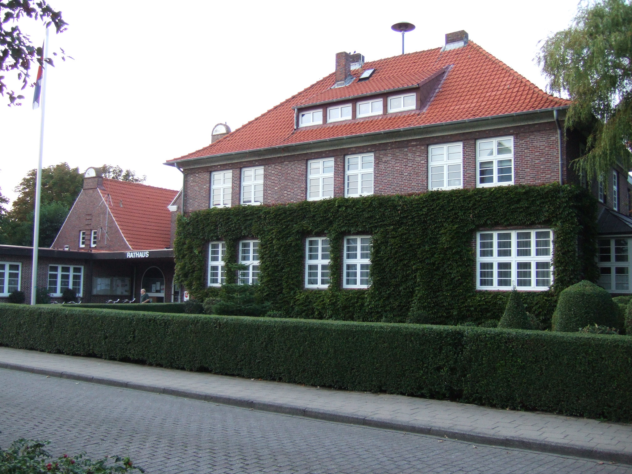 Rathaus der Nordseeinsel Langeoog